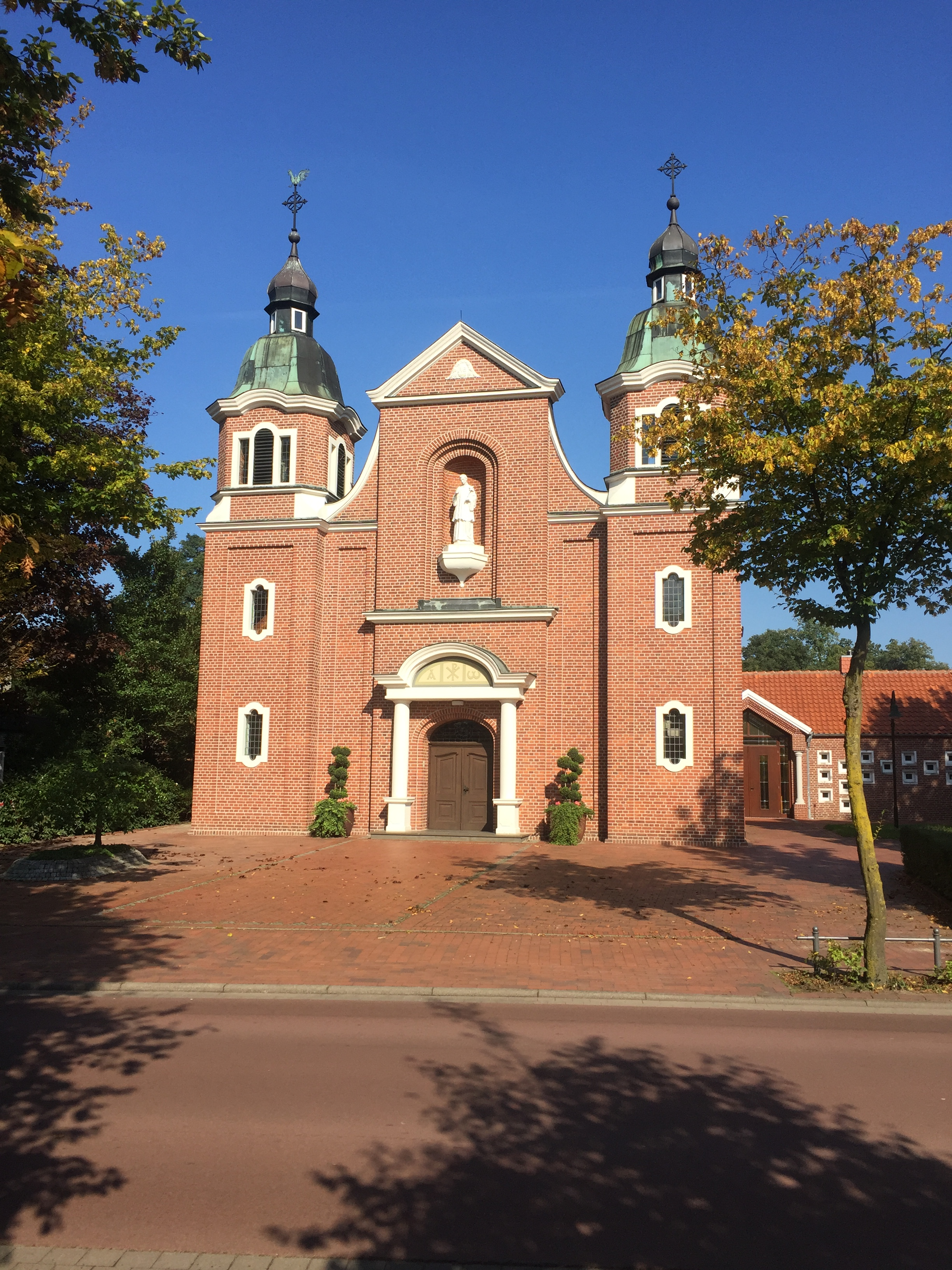 Kath. Kirche St. Aloysius Höltinghausen, Emstek